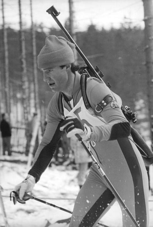 Frank Ullrich ADN-ZB Häßler 12-3-82-da- Zinnwald: 25. DDR-Meisterschaften im Biathlon- Zum Auftakt der DDR-Biathlon-Meisterschaften in Zinnwald verteidigte der 20-km-Weltmeister Frank Ullrich (ASK Oberhof) im 20-km-Einzelwettbewerb der Senoiren seinen Titel in 1:09:55,5 h und 2 Strafminuten.